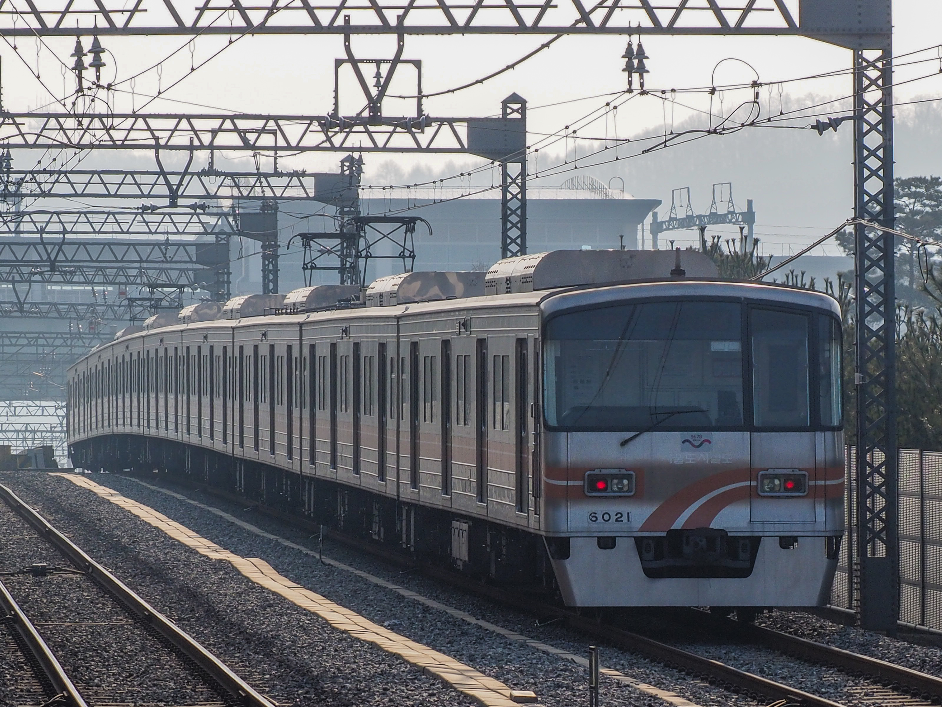 운행 종료 후 기지로 입고되는 서울도시철도 6호선 6000호대 621편성